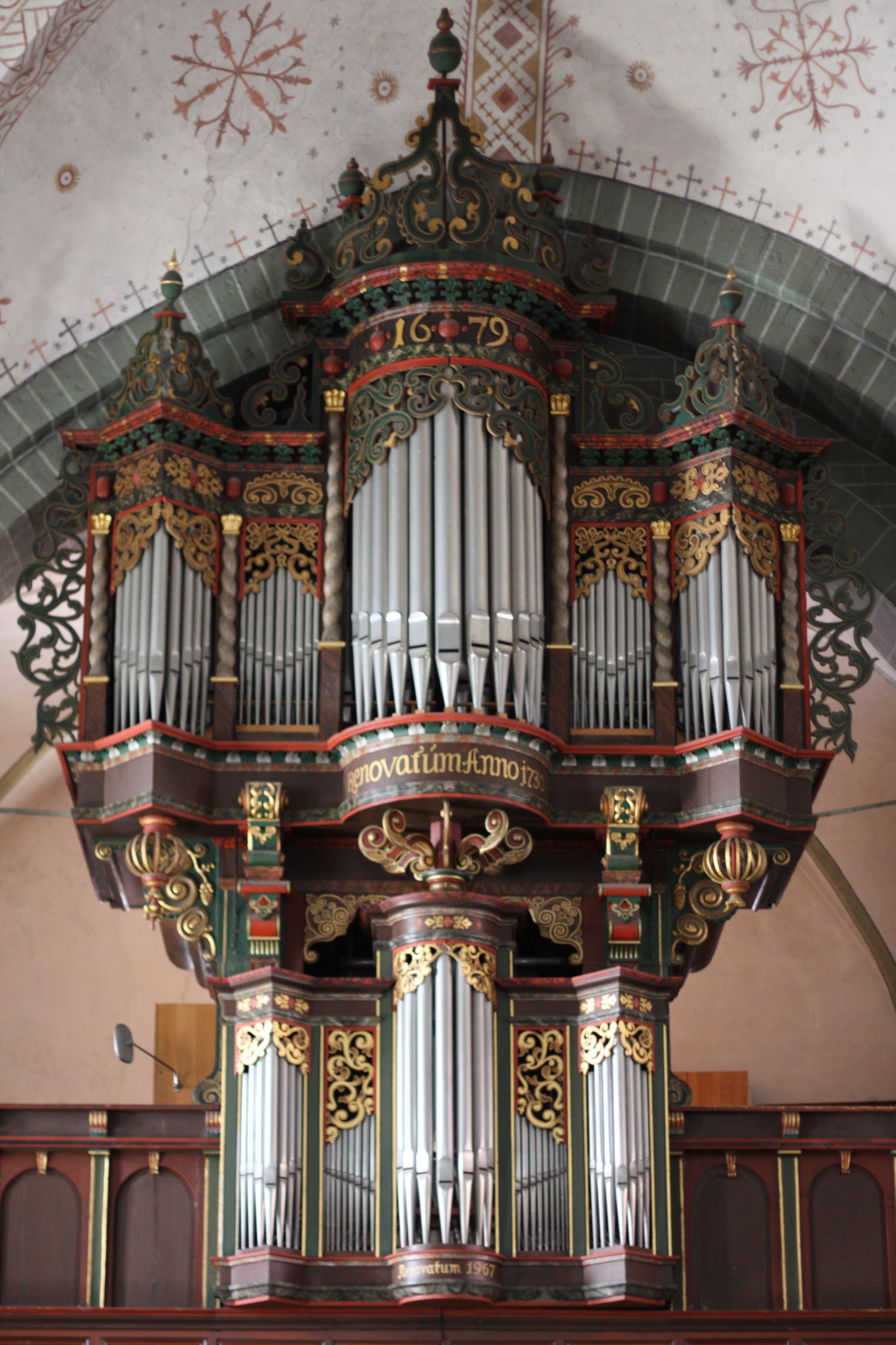 Orgel in St. Mariä zur Höhe in Soest